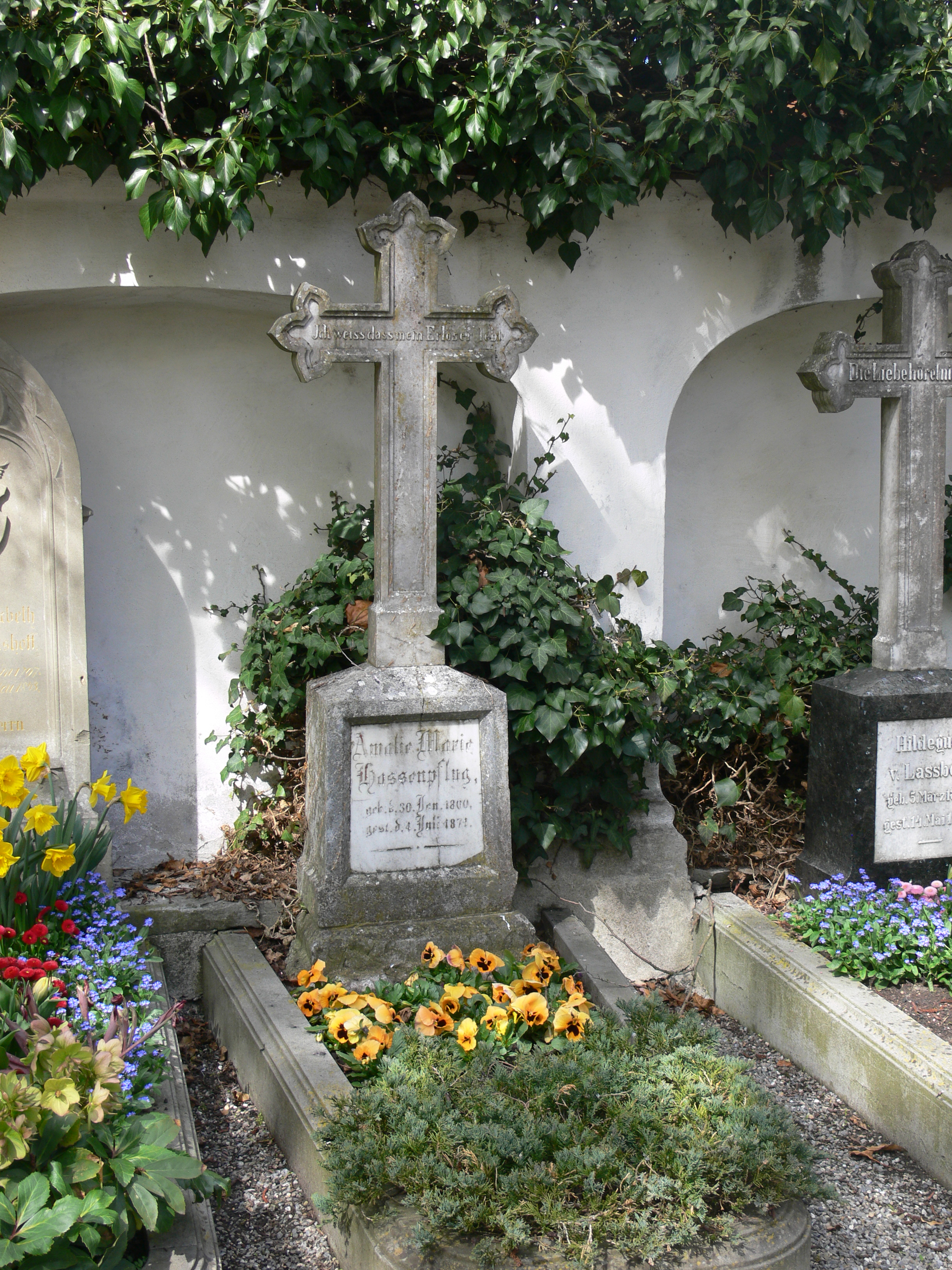 Friedhof in Meersburg (Bodenseekreis) Grabstätte Amalie Marie Hassenpflug